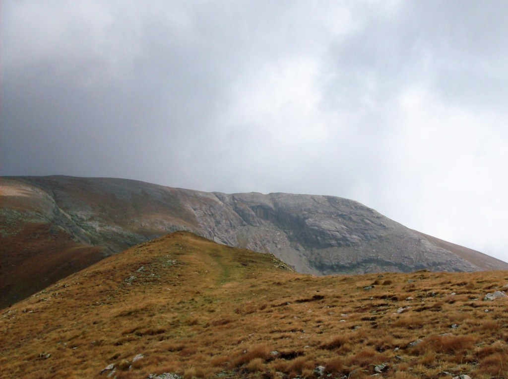 La cresta sommitale di Cima Pian Ballaur vista dal Colle del Pas